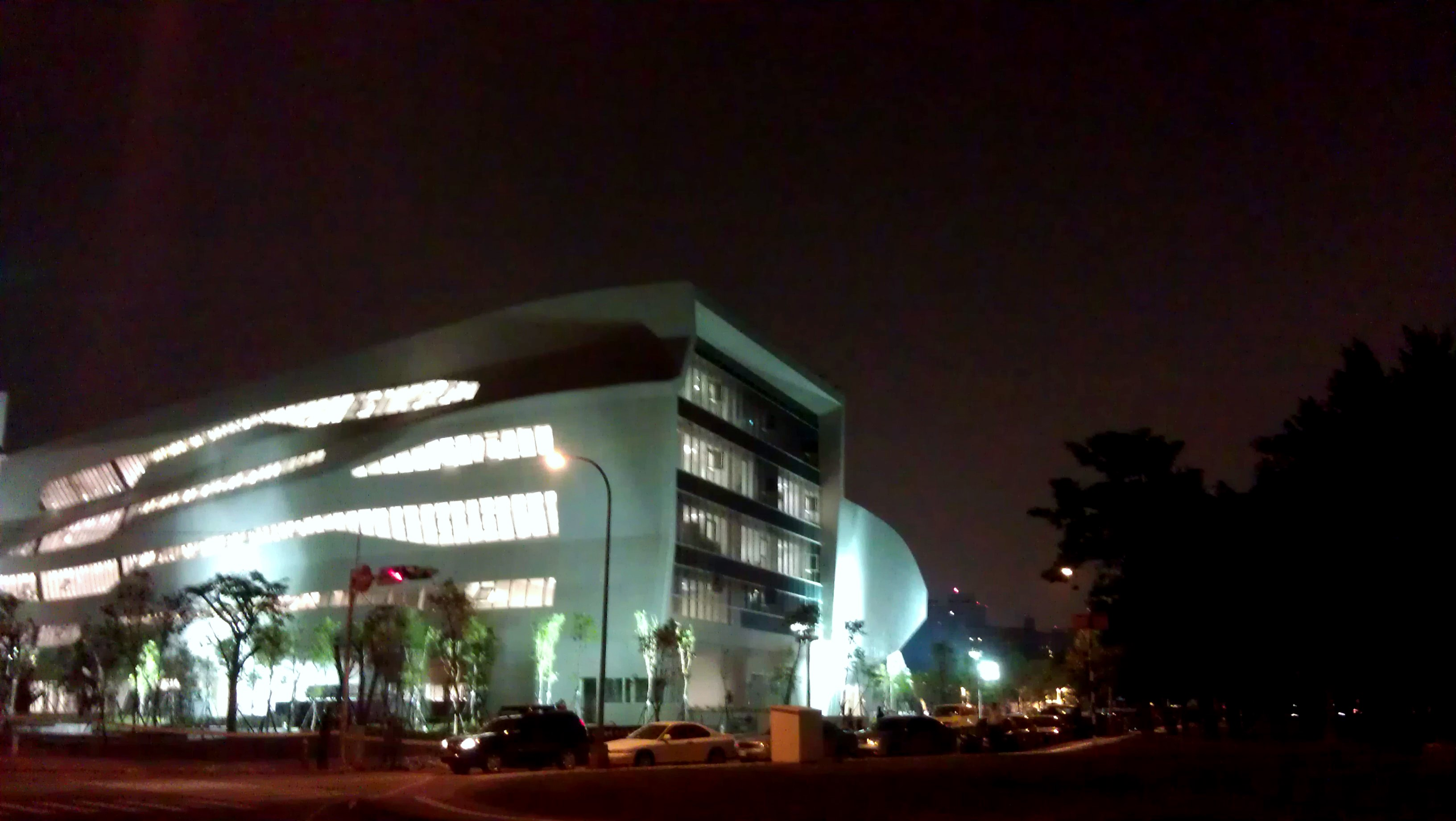 國立台中圖書館新館